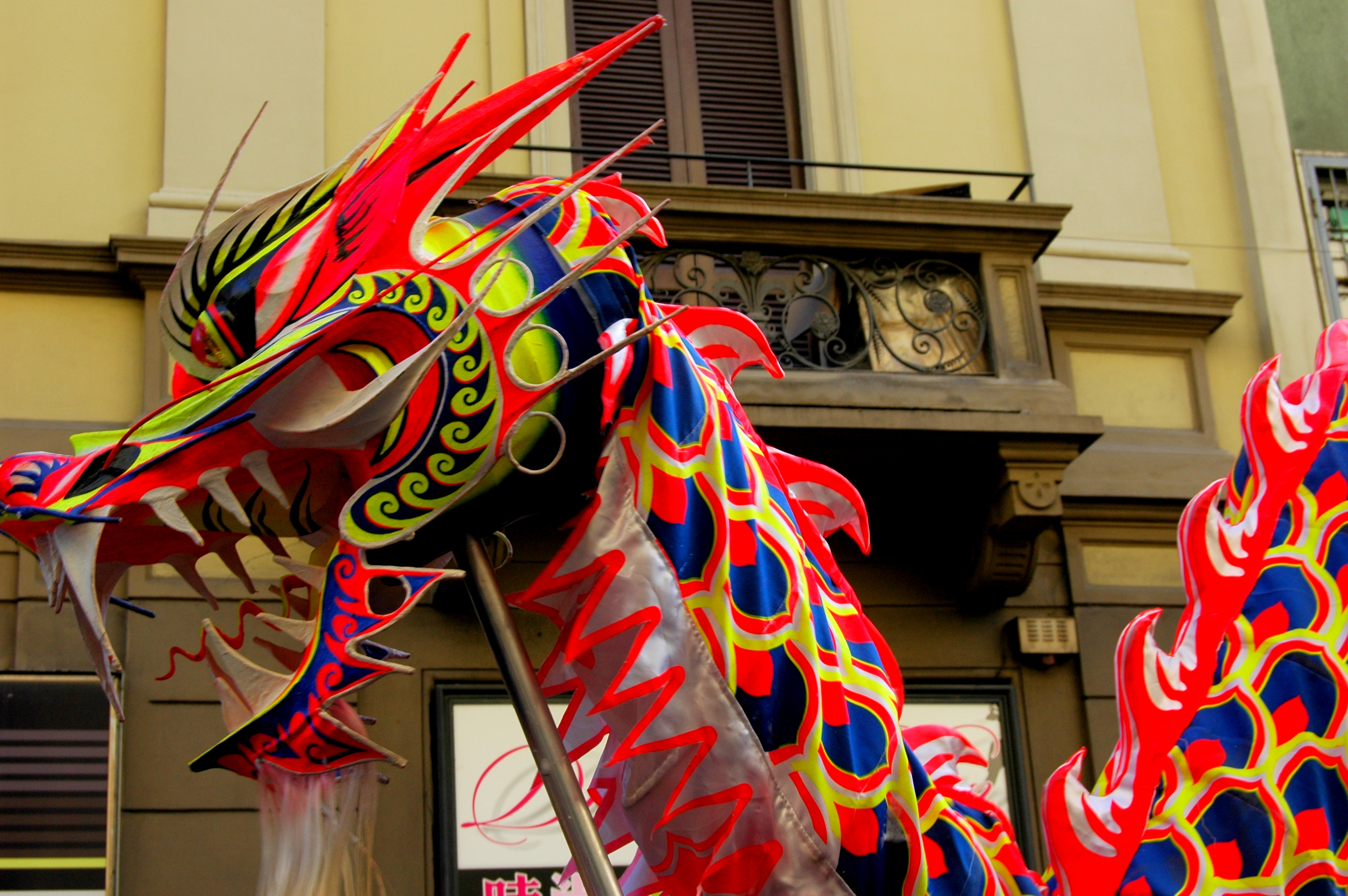 Chinatown Milano, Capodanno Cinese, sfilata dei dragoni in via Paolo Sarpoi